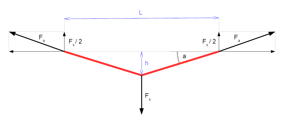 Schéma statique de répartition des forces dans une slackline en tension